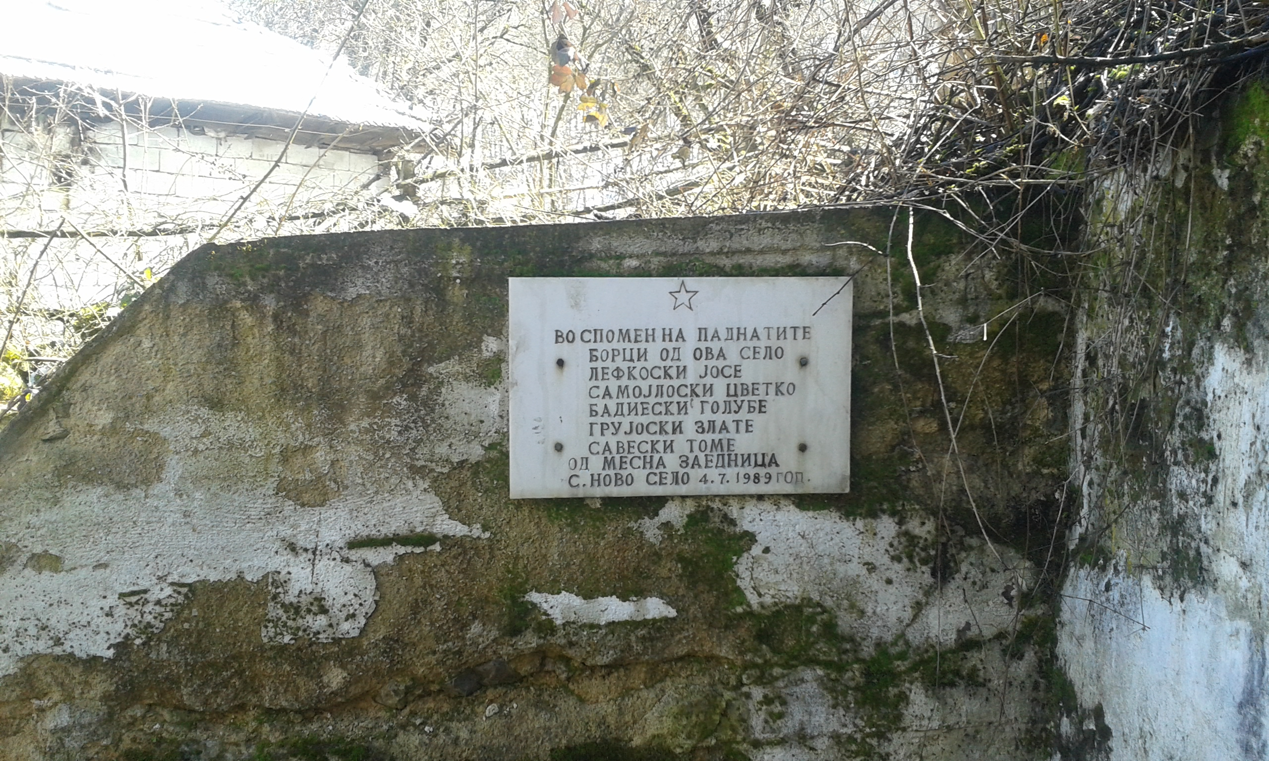 Спомен плоча во Ново Село, посветена на паднатите борци од селото во НОВ